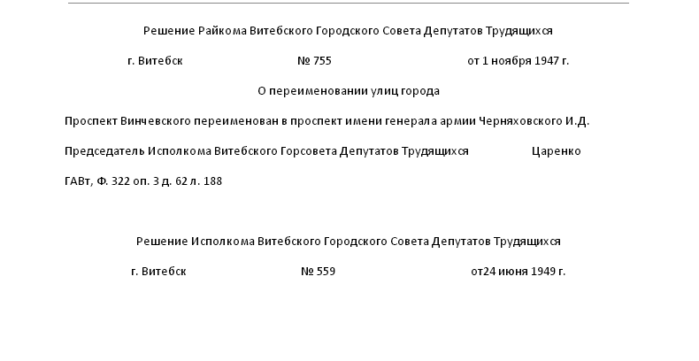 архивные сведенья